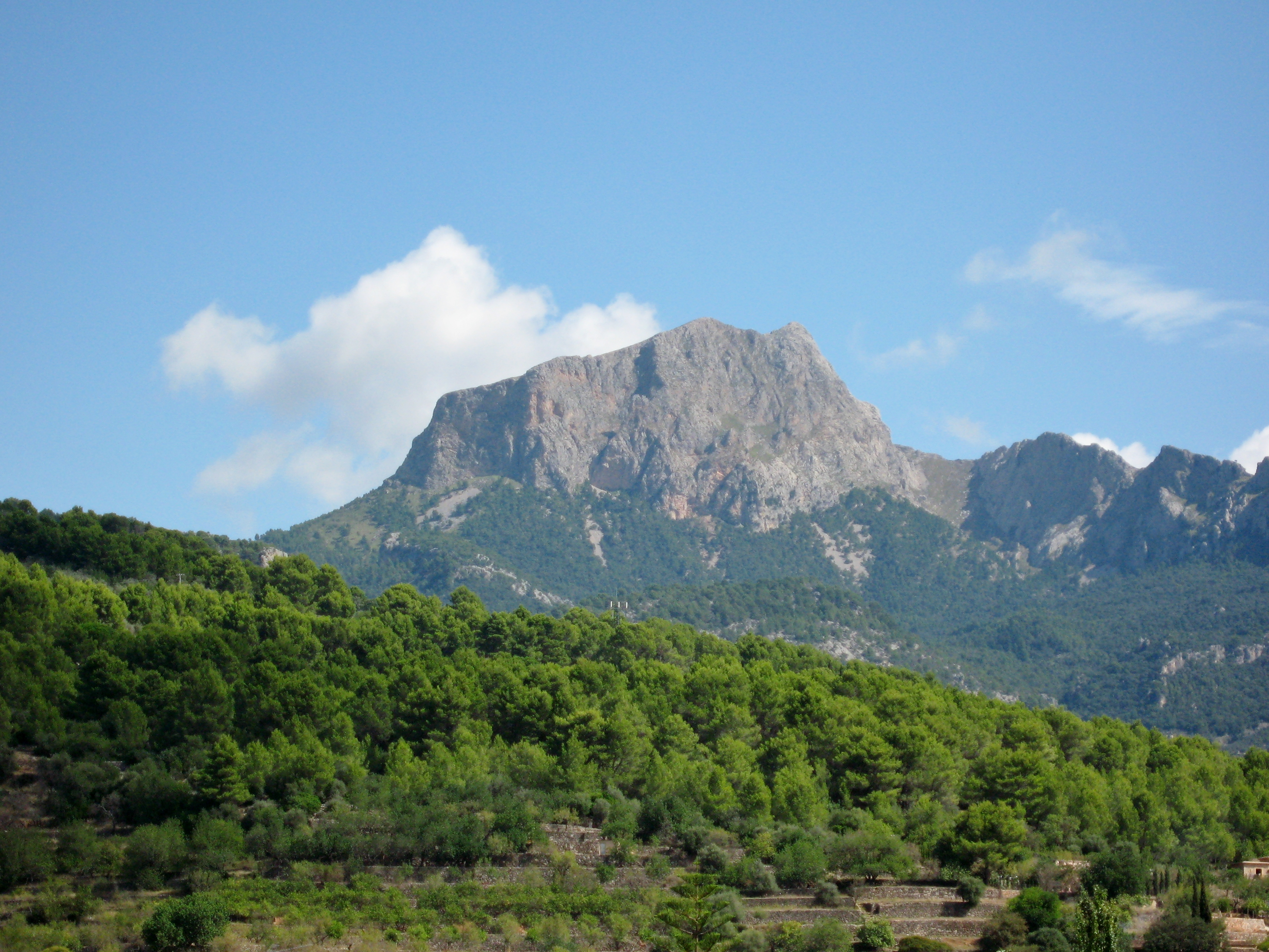 Puig Major: Höchster Berg der Insel Mallorca, aus Blickrichtung Sóller, Spanien